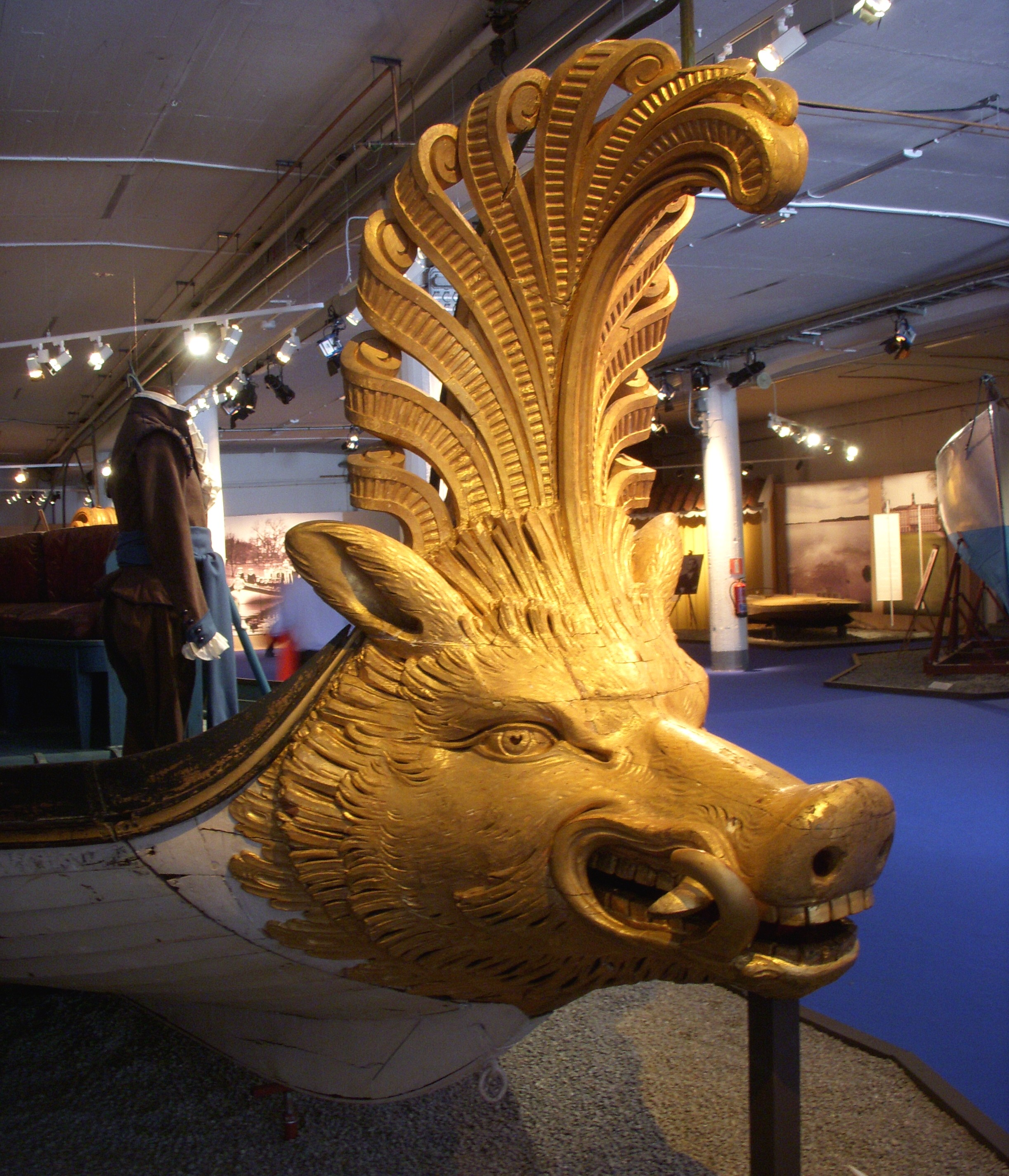 Gustav III:s lustbåt "Galten"